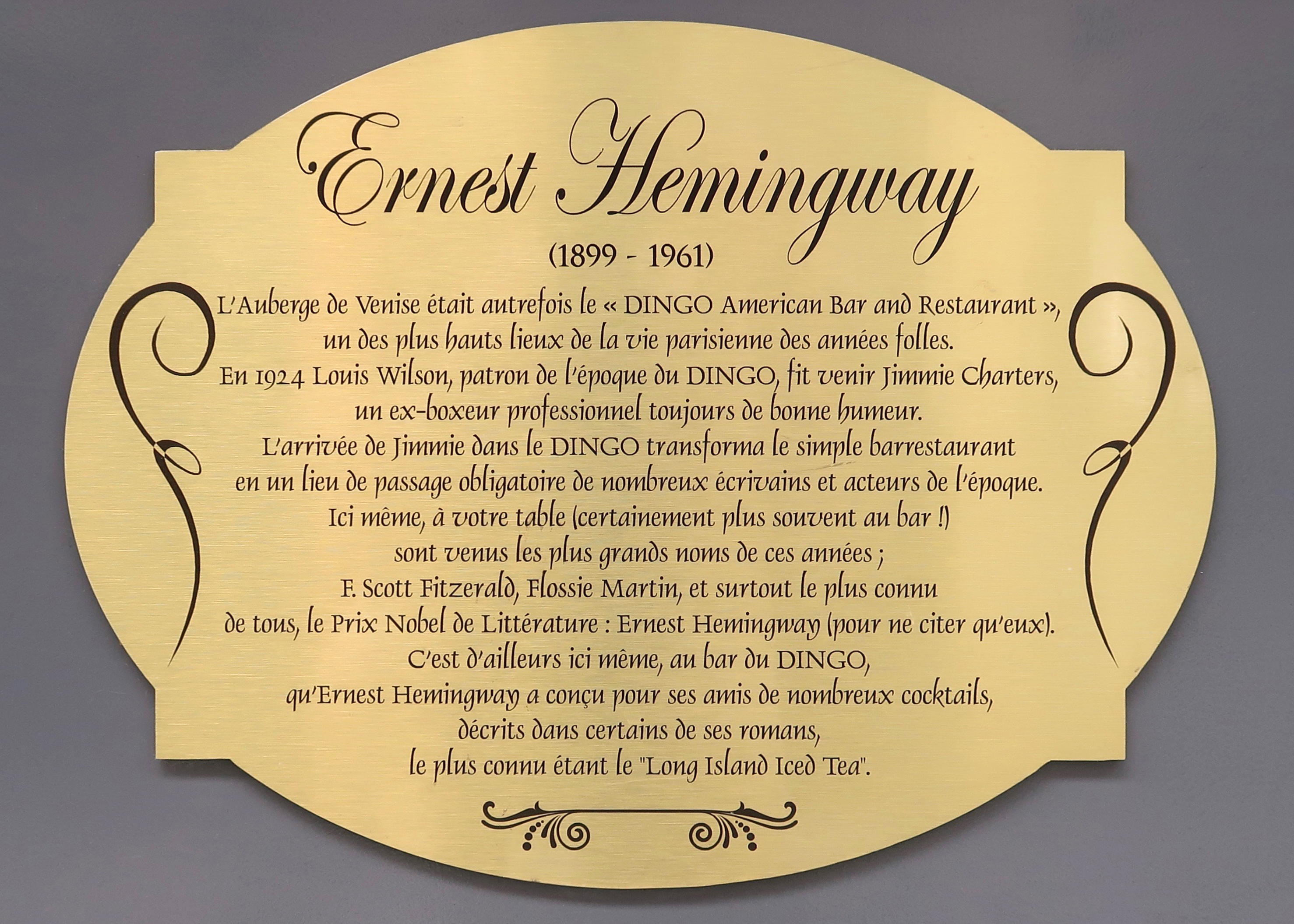 Plaque en hommage à Ernest Hemingway, 10 rue Delambre (Paris, 14e), devant le restaurant l'Auberge de Venise.